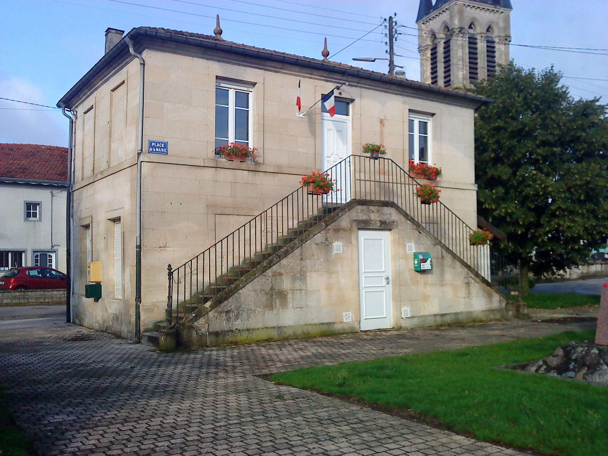 La mairie d'Hévilliers, commune du département de la Meuse (Lorraine, France).